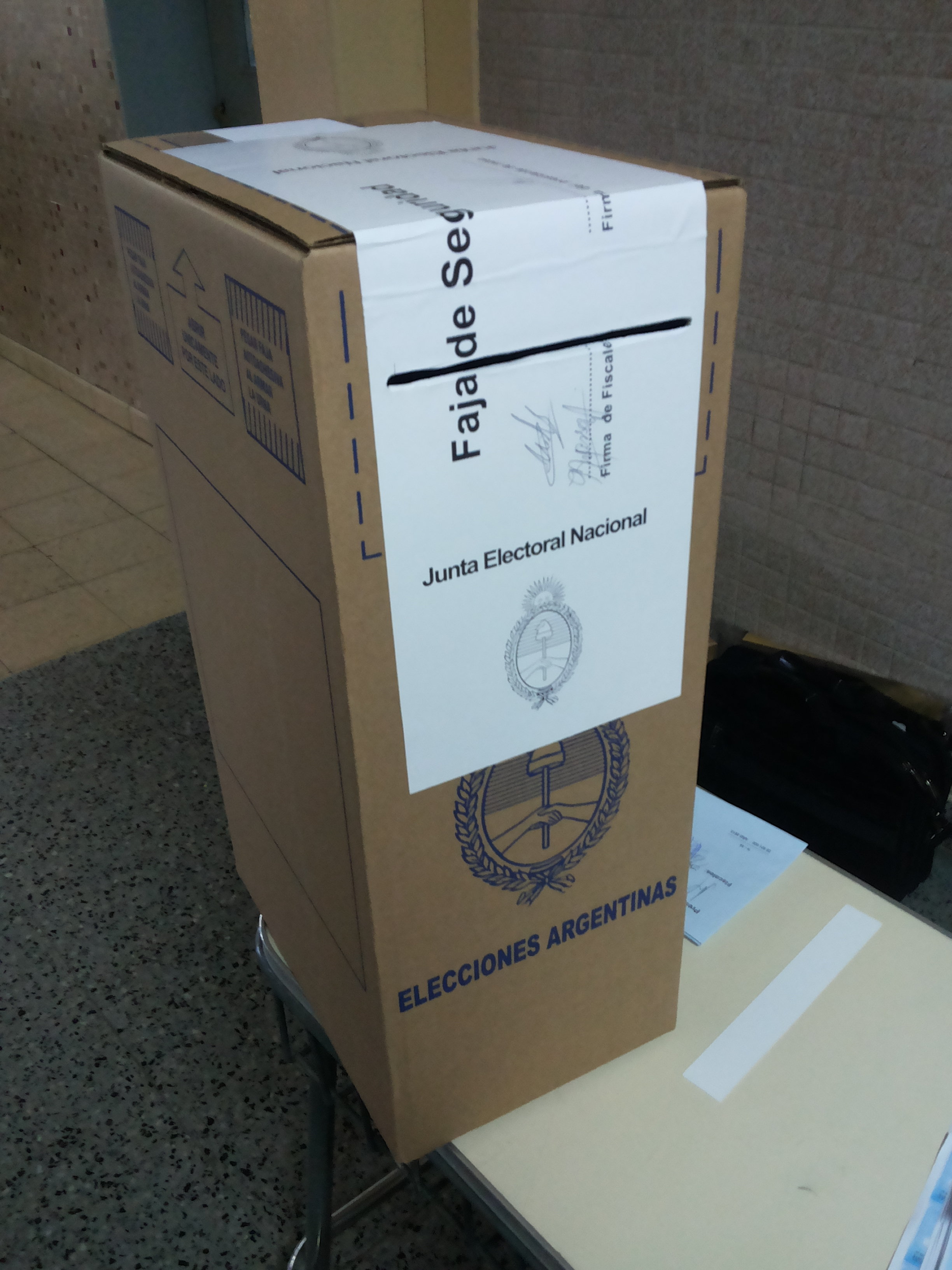 Urna electoral de las elecciones generales de 2015. Trelew, Chubut, Argentina.